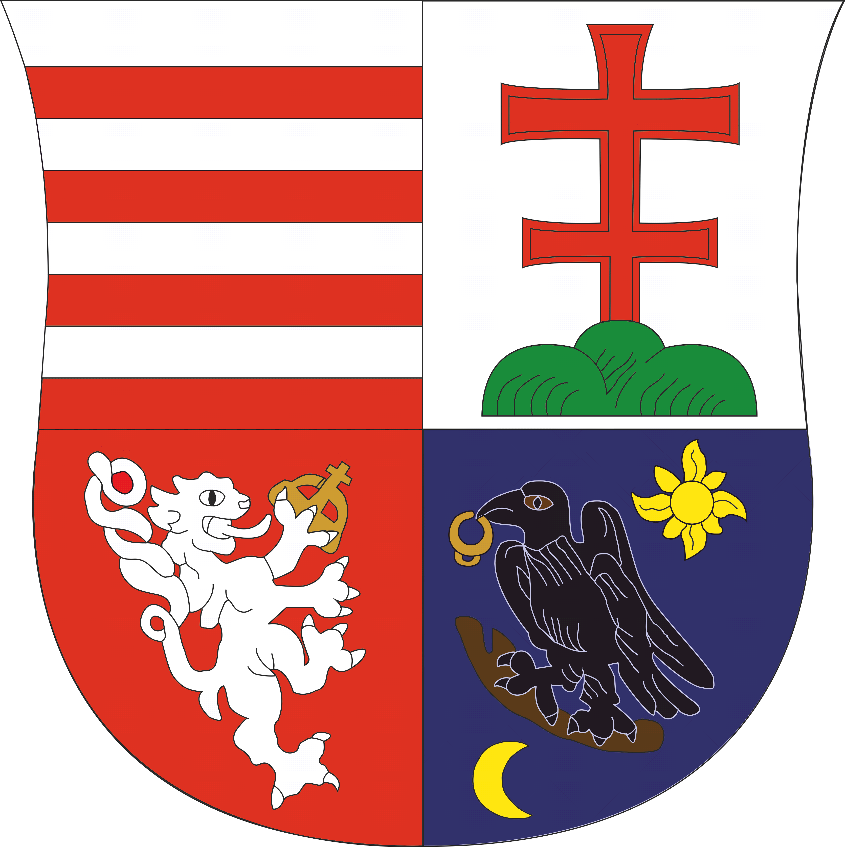 A Hunyadi Rend címere a módosított Hunyadi Mátyás címer.